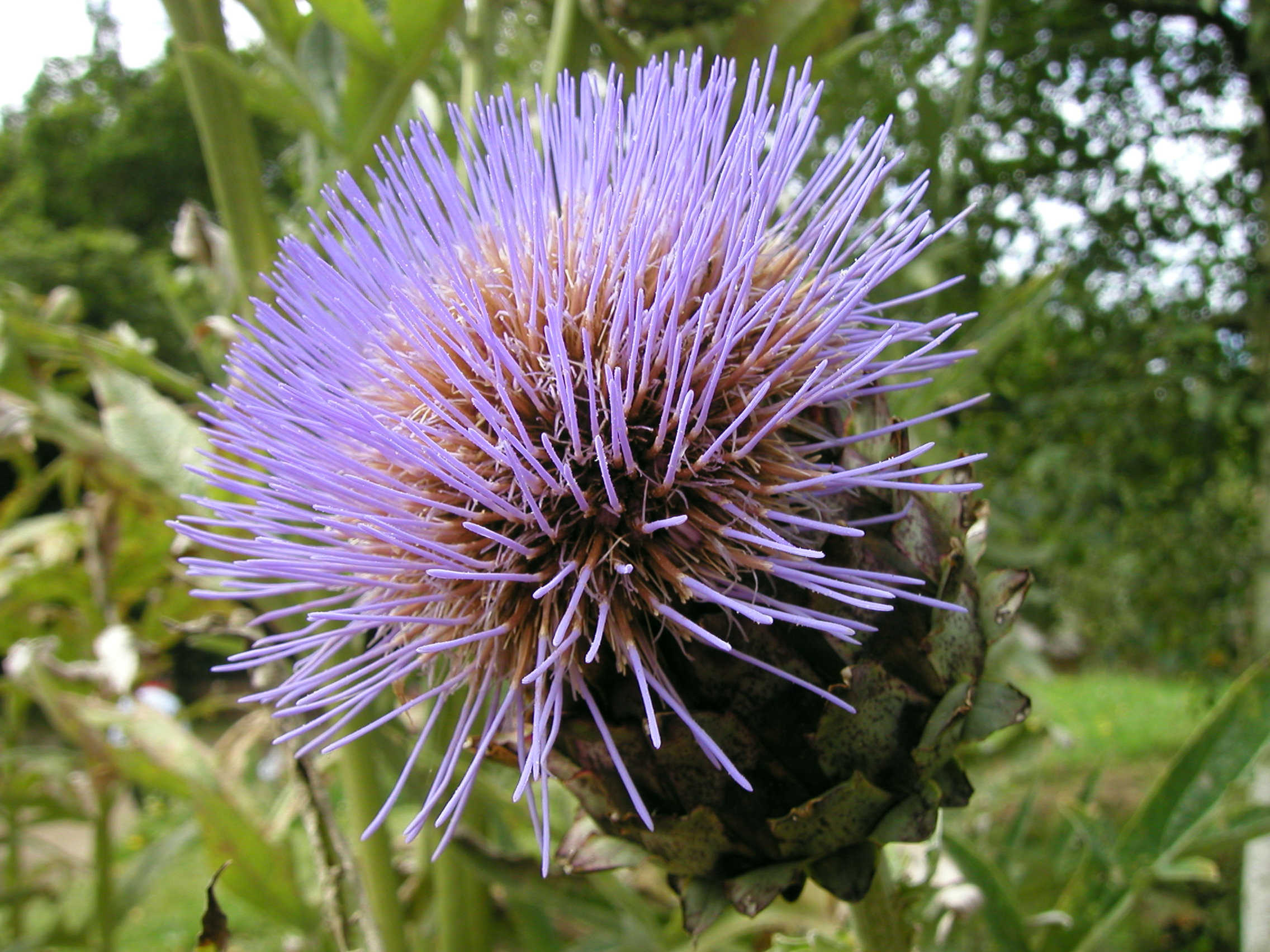 Geöffnete Artischockenblüte